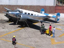 4-G-14 en la Escuela Jorge Newbery.